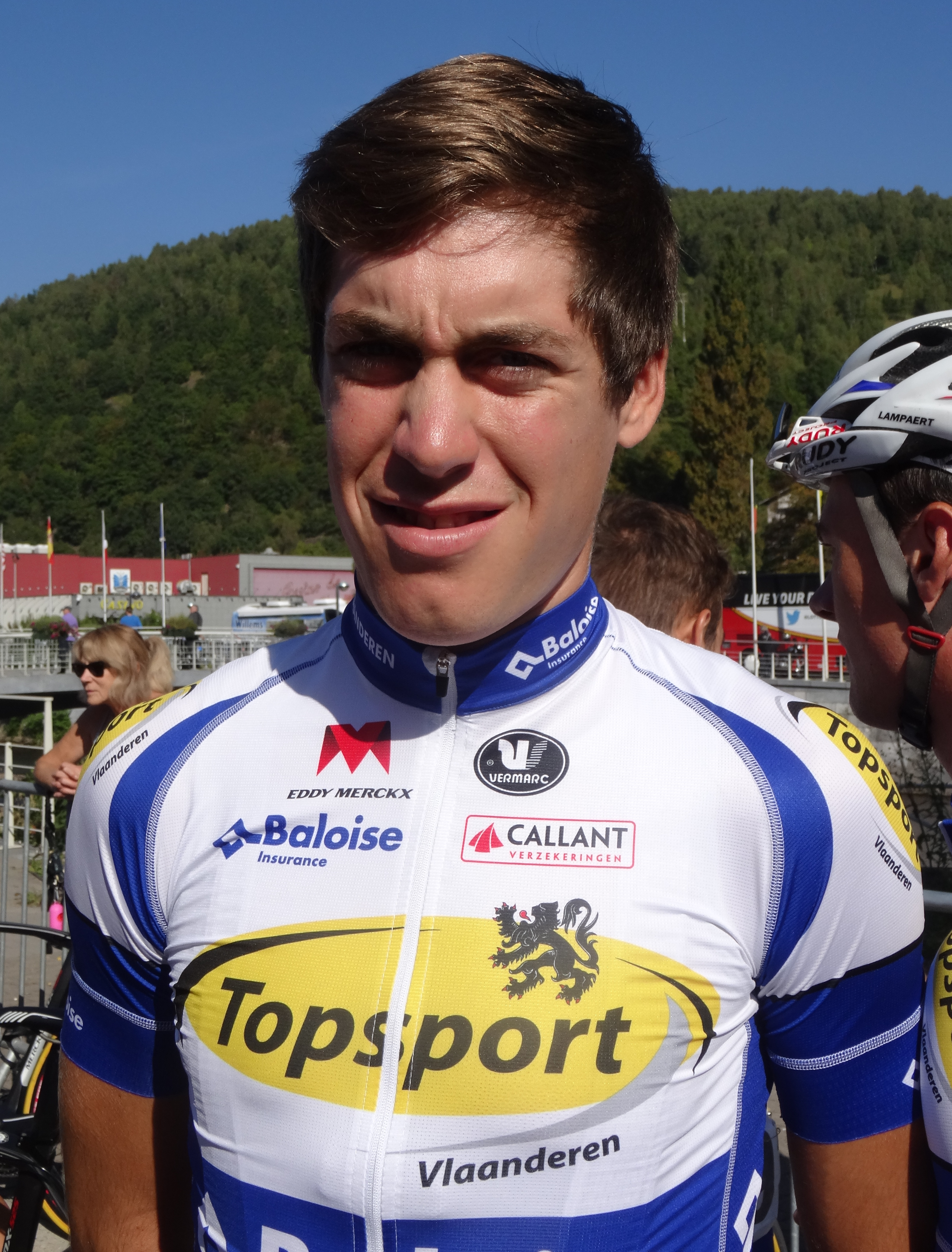 Reportage photographique réalisé le mercredi 17 septembre à l'occasion du départ du Grand Prix de Wallonie 2014 à Chaudfontaine, Belgique.